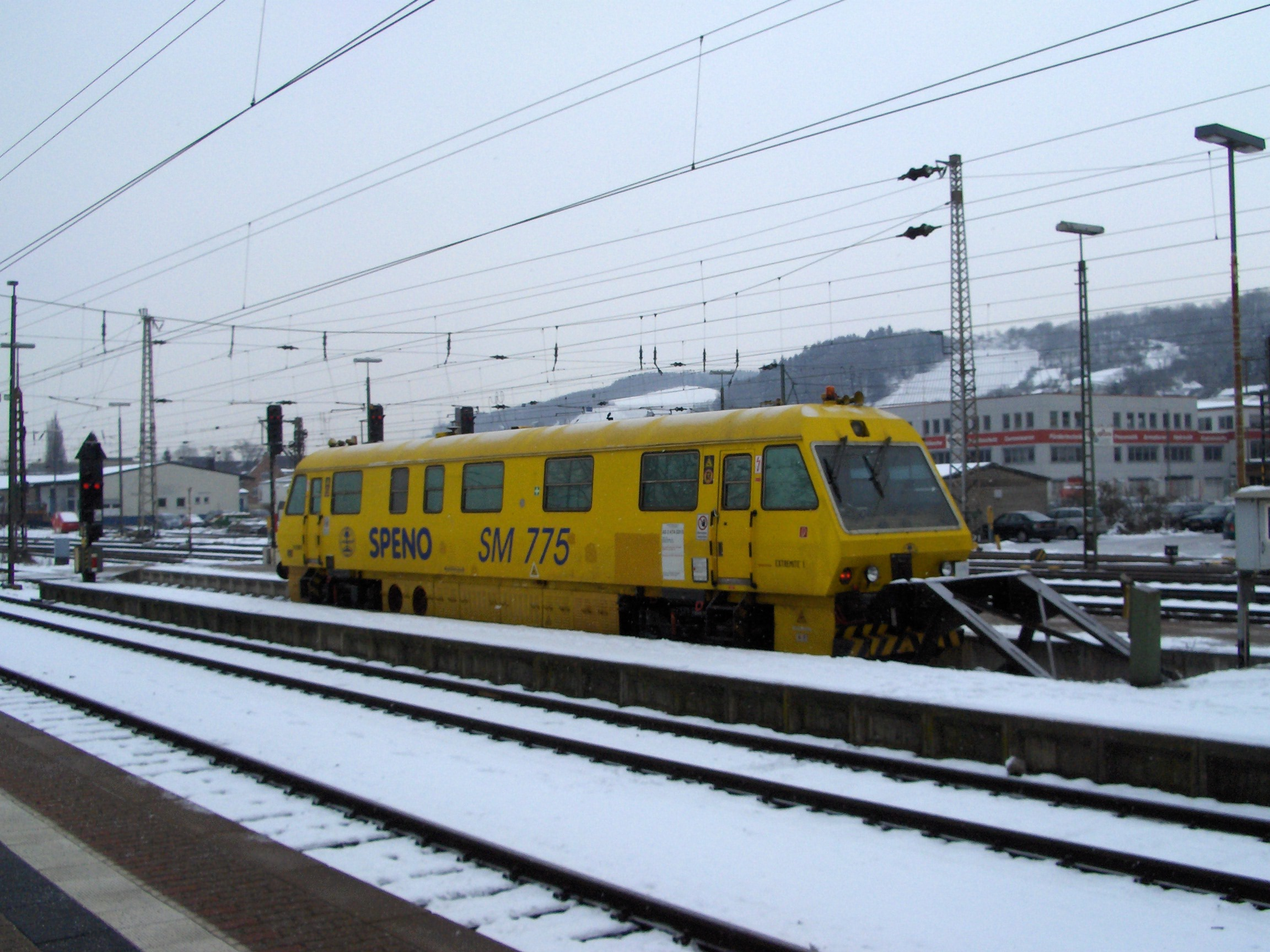 Der Schienenoberflächen-Meßtriebwagen Speno SM 775 am 23 Februar 2005 im Trierer Hauptbahnhof.